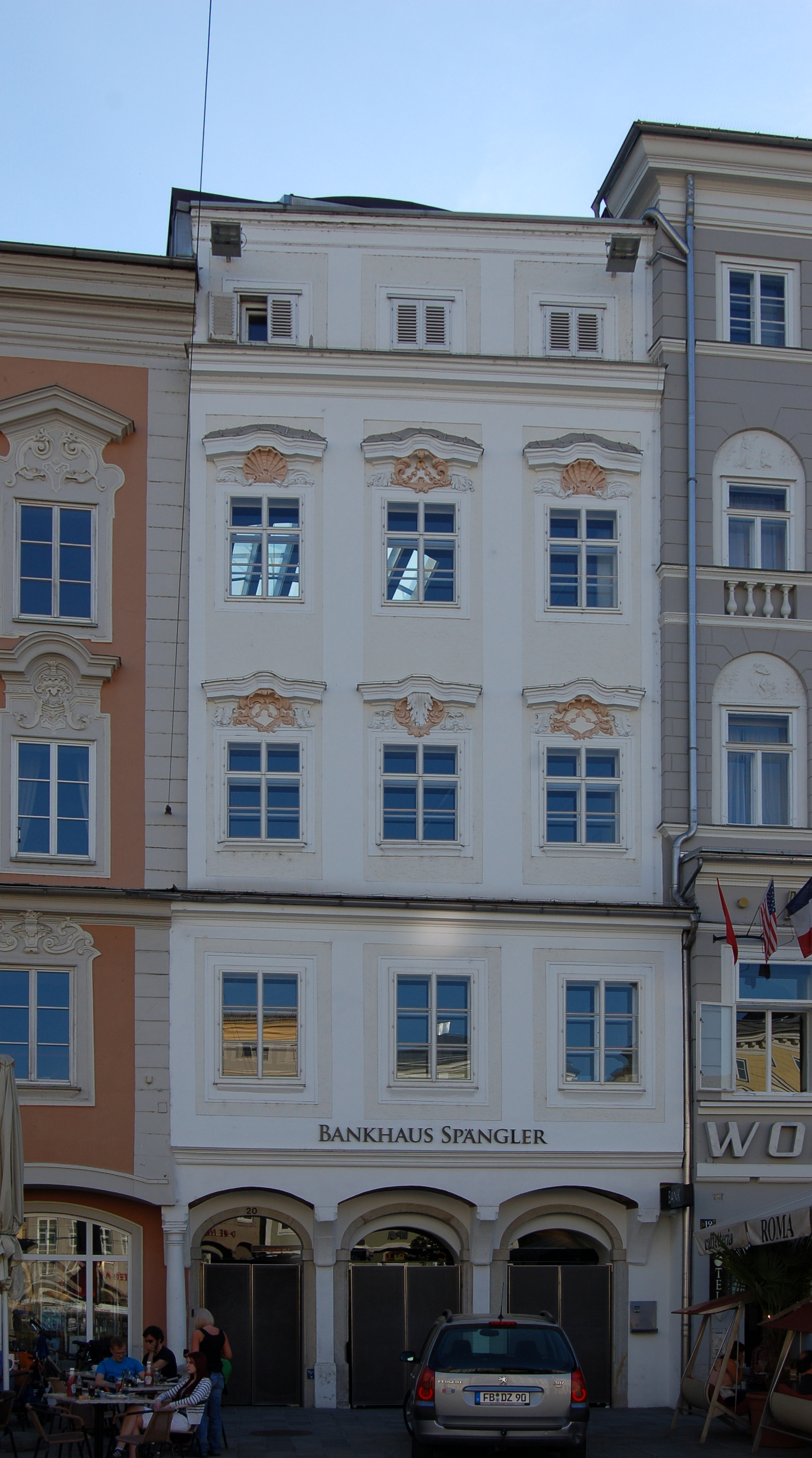 Das denkmalgeschützte Haus am Hauptplatz 20 in Linz (Oberösterreich).